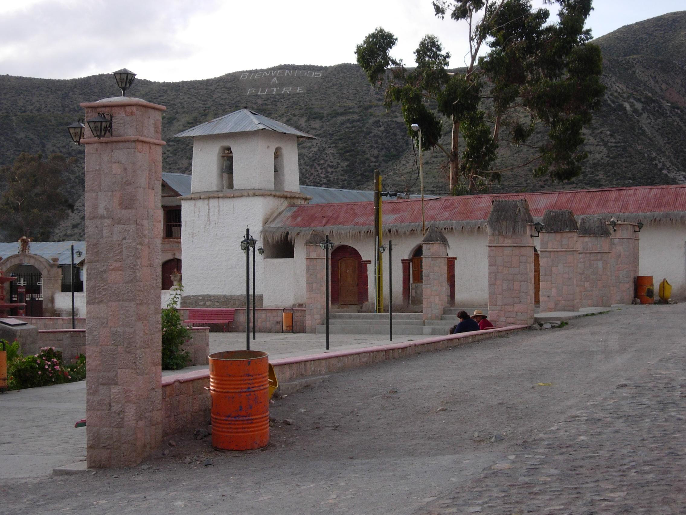 Diese Bild zeigt den Marktplatz in Putre